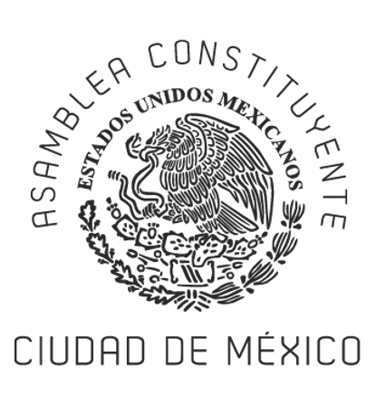 logo de la asamblea constituyente de la cdmx